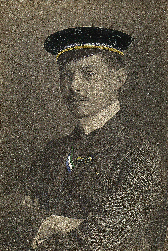 Porträtfotografie des Chirurgen Karl Scheele